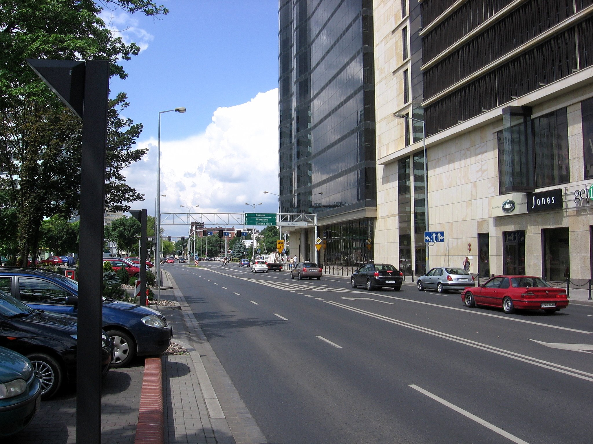 ulica Swobodna we Wrocławiu, widok sprzed Arkad Wrocławskich i EPI-marketu w kierunku zachodnim